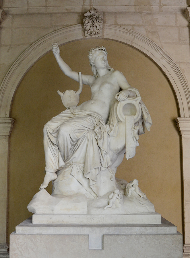 Castalie ou Source de la poésie (1883), Eugène Guillaume (Montbard, 1822 – Rome, 1905) marbre de Carrare, signé daté en bas à droite ; inscription sur la partie avant du socle : « Castalie » ; dépôt du Fonds National d’Art Contemporain, 1997. C’est la source de toute poésie que l’artiste a voulu symboliser dans cette image de la fille du dieu fleuve Achéloüs, Castalie, qui poursuivie par le dieu Apollon, préféra se jeter dans une fontaine que de céder à ses avances. Assise sur une roche saillante du Parnasse, la nymphe tient une lyre. Le bras gauche est posé sur l’urne traditionnelle d’où s’échappent les eaux généreuses qui confèrent le don de poésie et de divination. Un petit génie ailé est en train de s’y désaltérer.